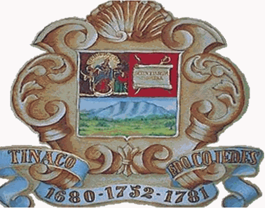 Escudo del municipio Tinaco, estado Cojedes, Venezuela